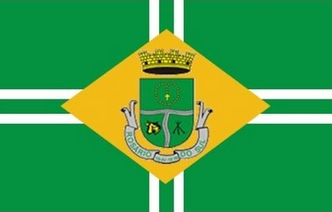 Bandeira do município gaúcho de Rosário do Sul